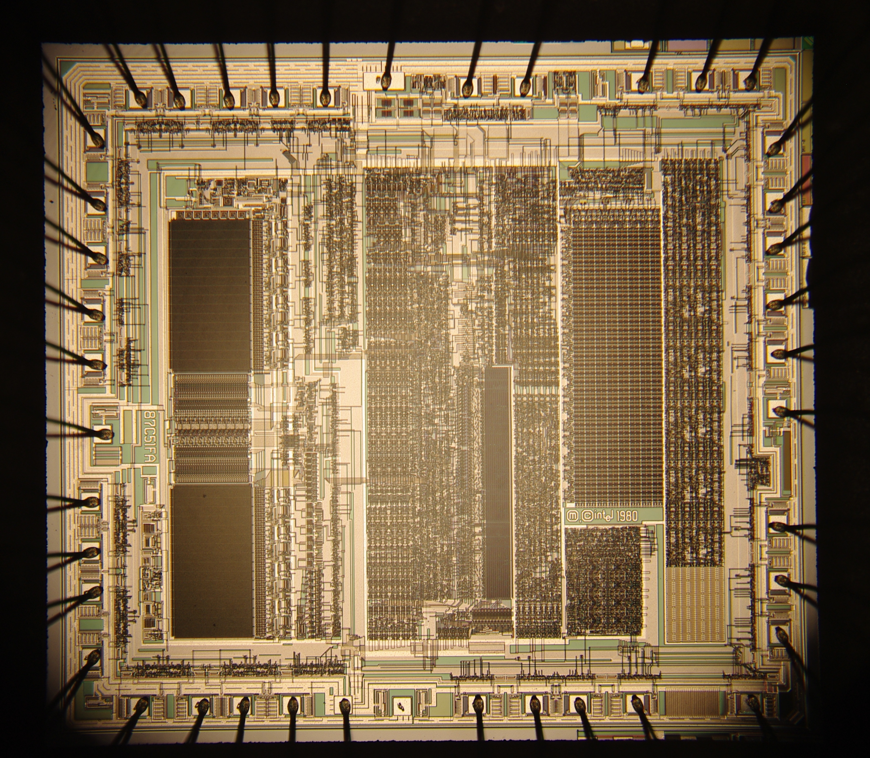 EPROM-Microcontroller Intel 87C51